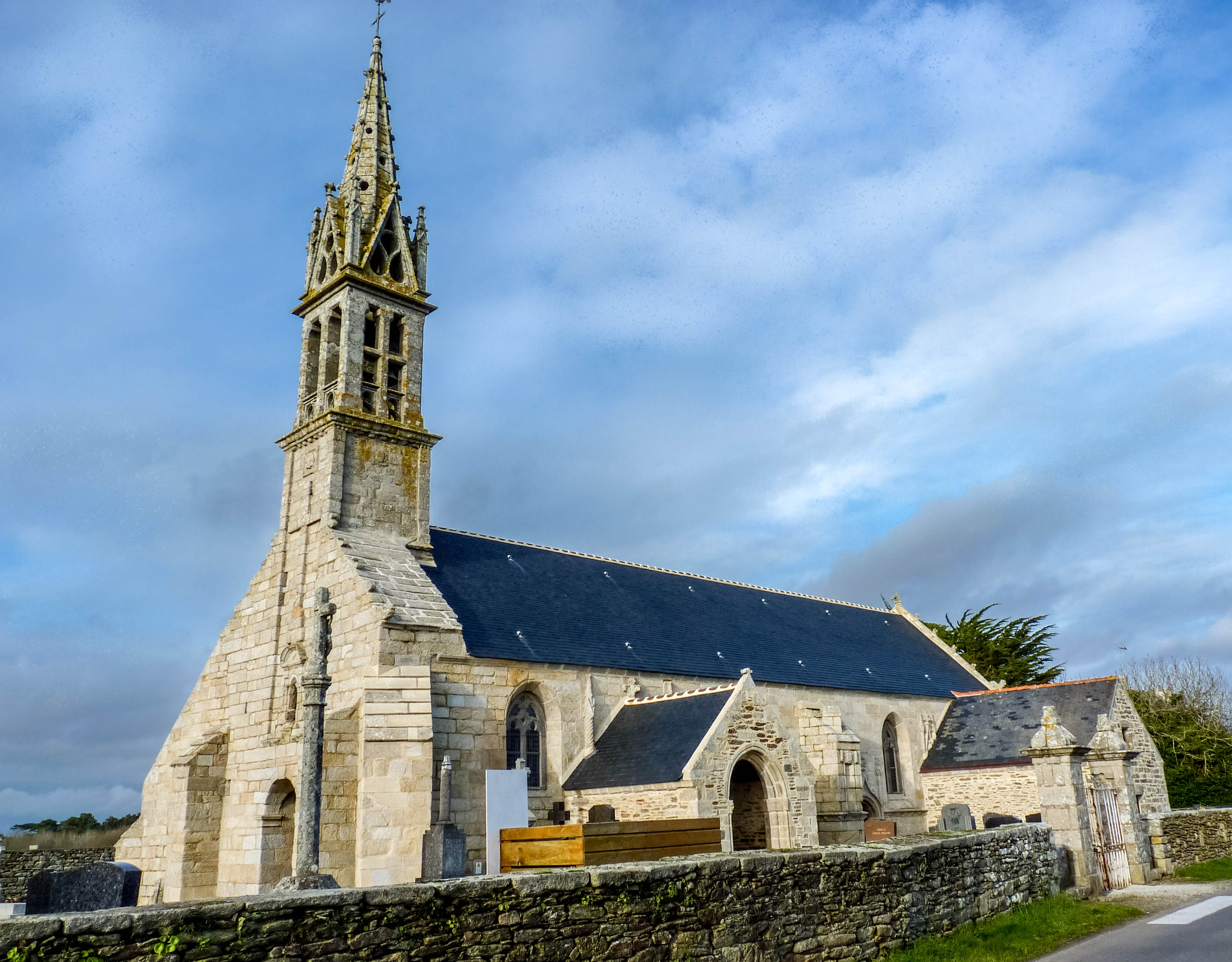 Eglise de Tréguennec